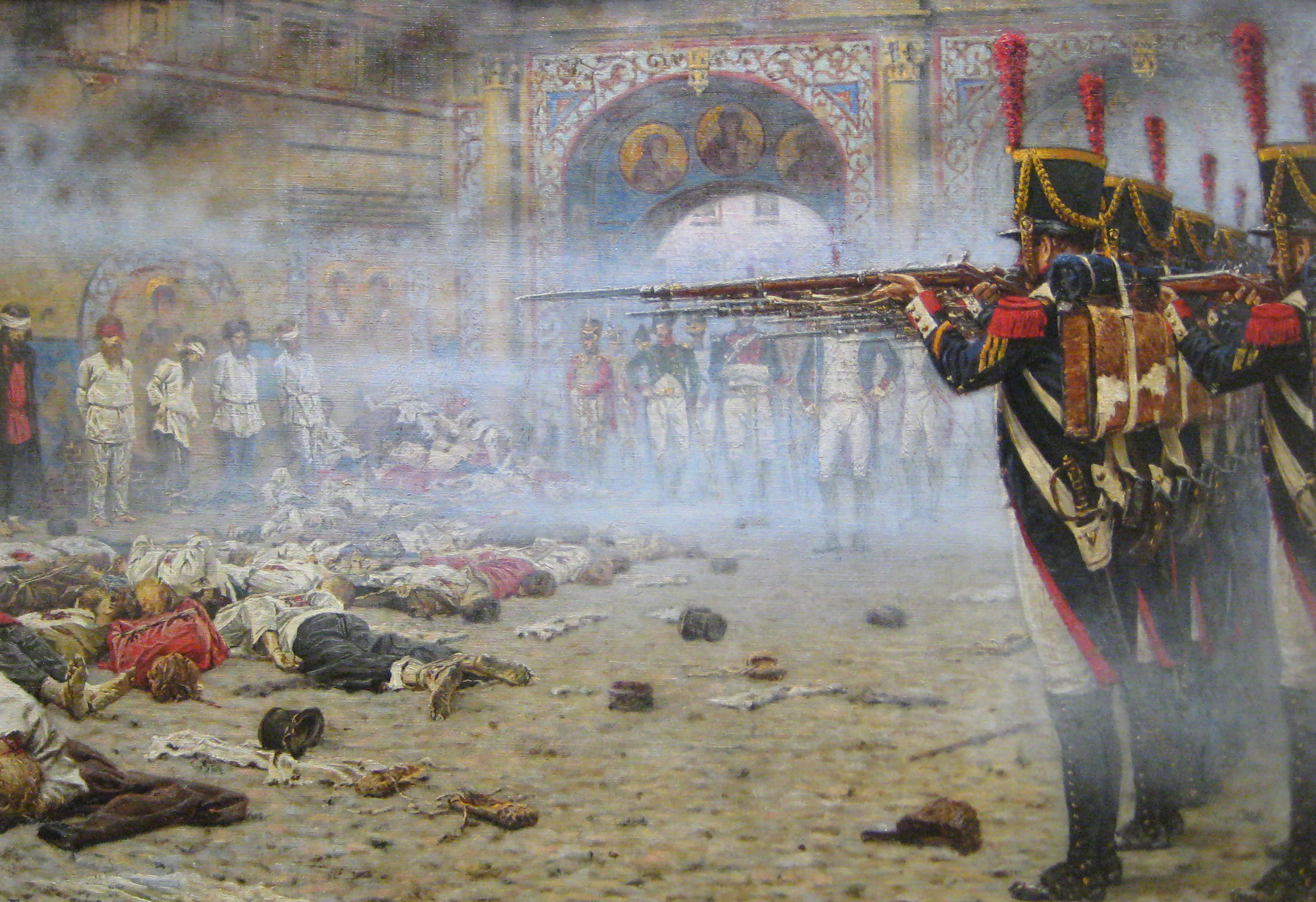 В покоренной Москве